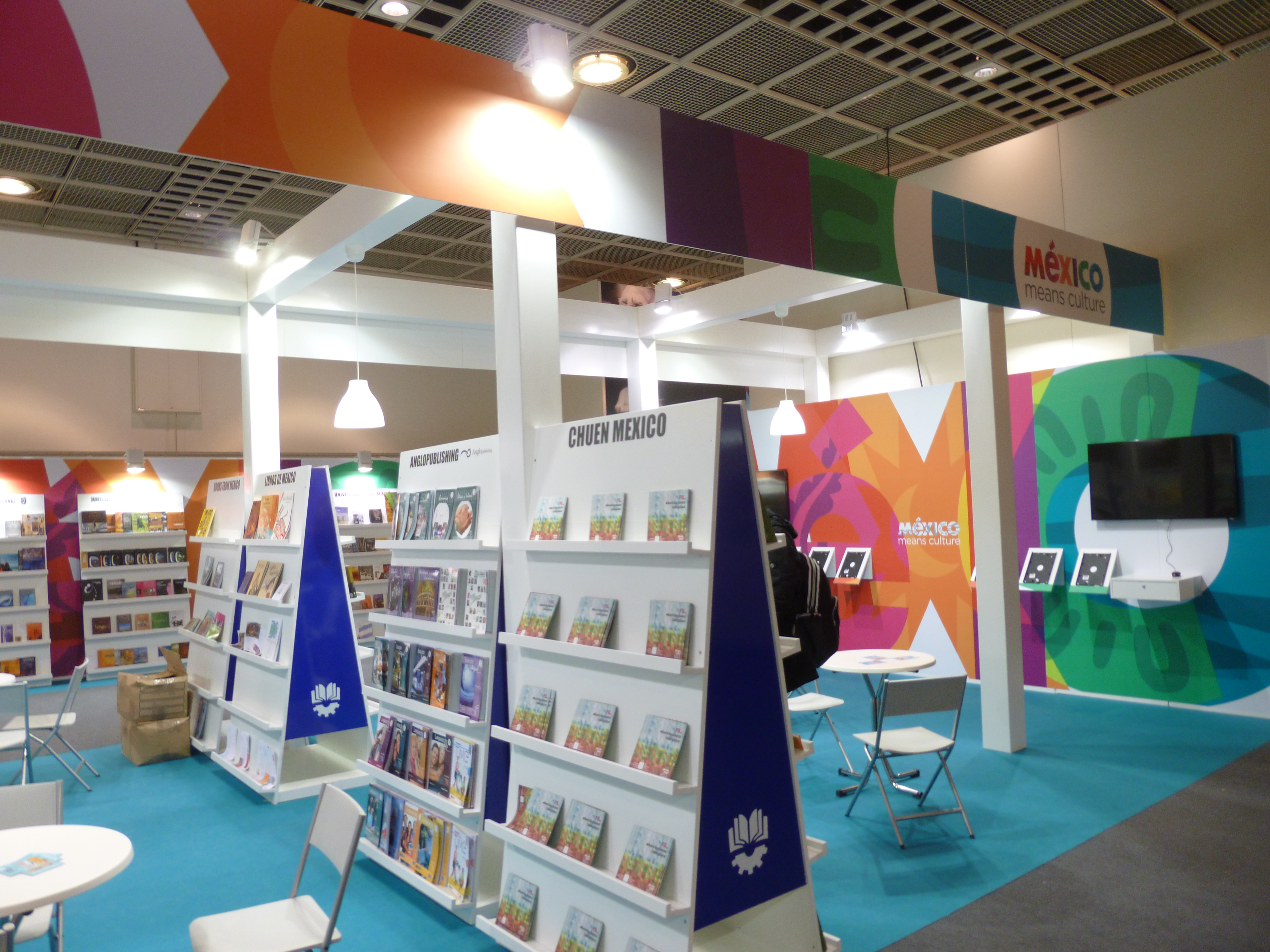 stando de la literaturo de Meksiko en la Frankfurta librofoiro 2012